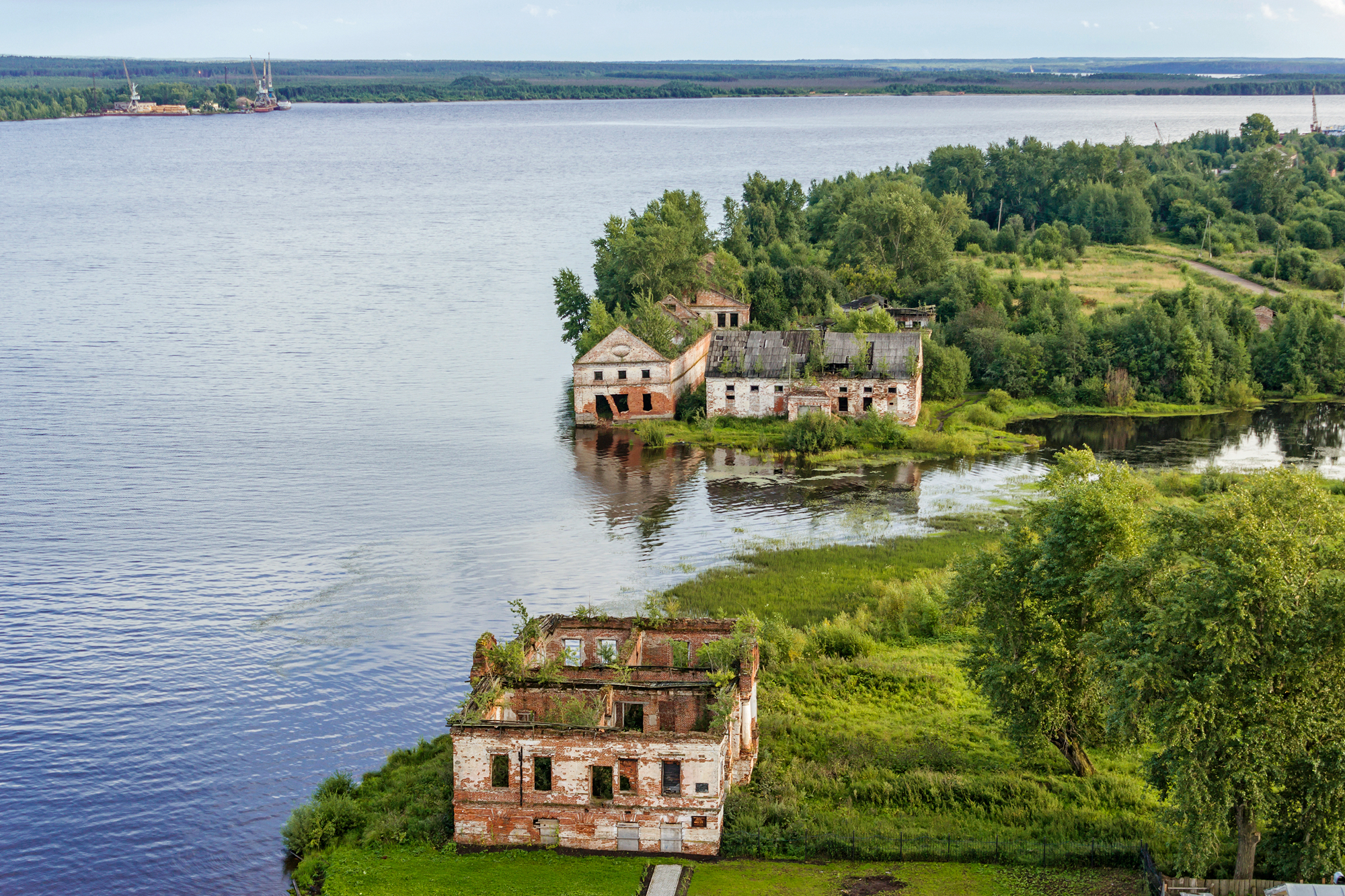 Припасной амбар у Лазаревых: улица Спасская, 6, Усолье, Усольский район, Пермский край